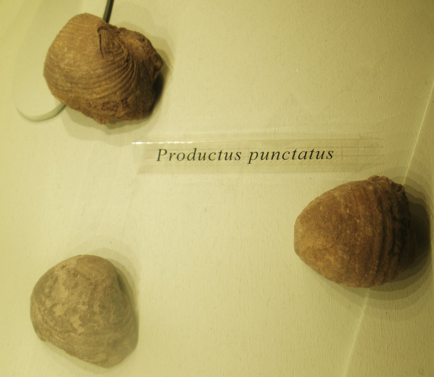 Fossil of Productus, an extinct brachiopod- Took the picture at Museo di Paleontologia di Firenze